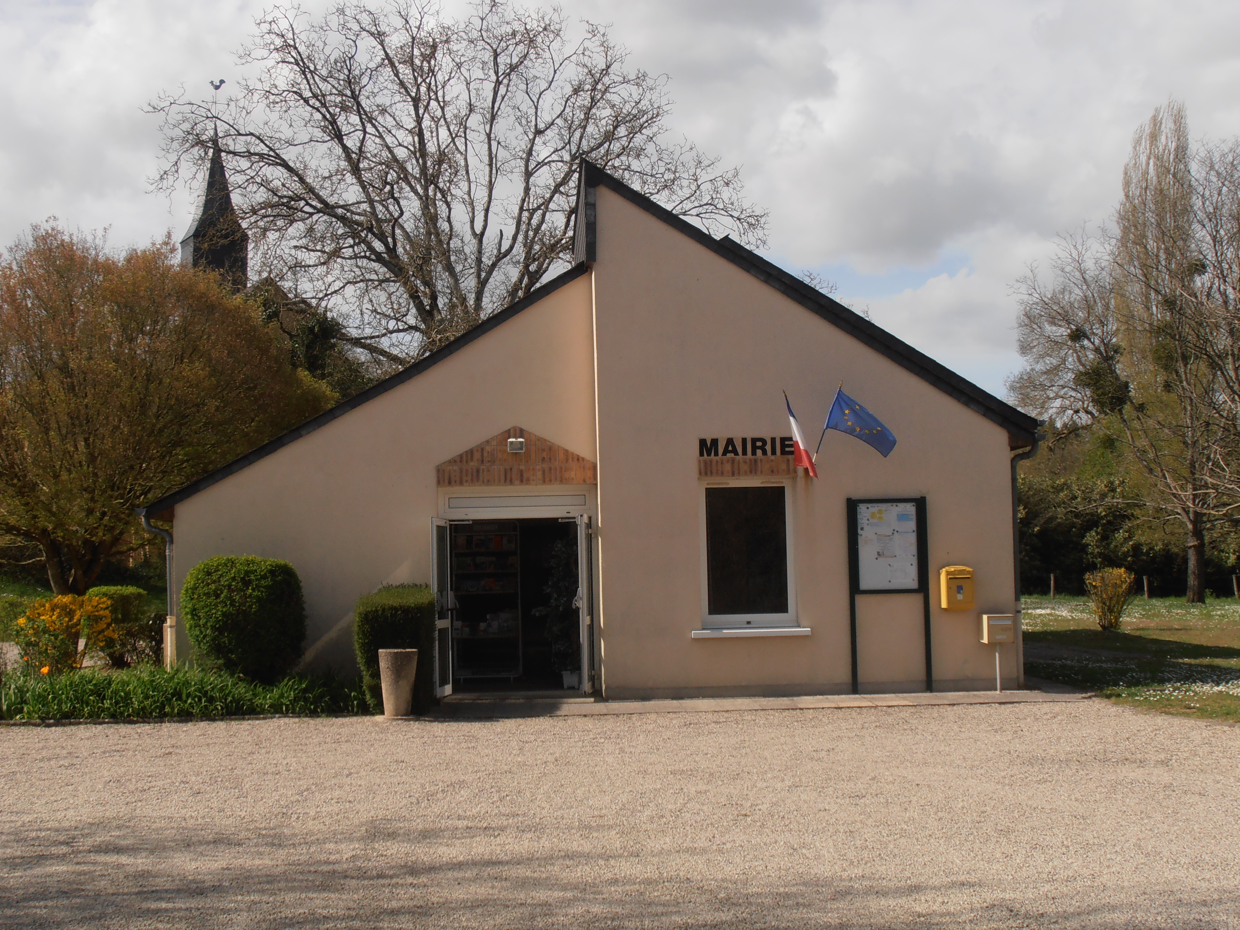 La mairie de Dureil